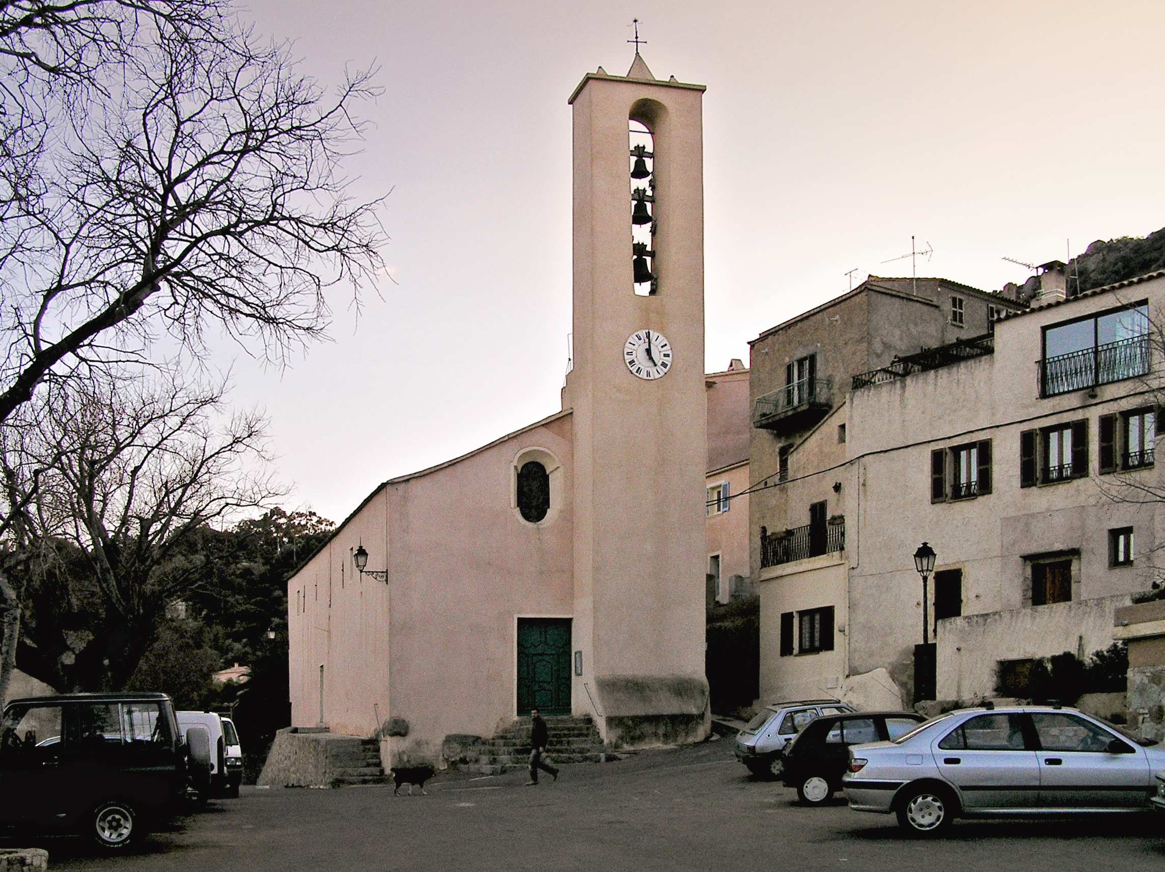 Monticello, Balagne (Haute-Corse) - Place du village et église San Sebastianu